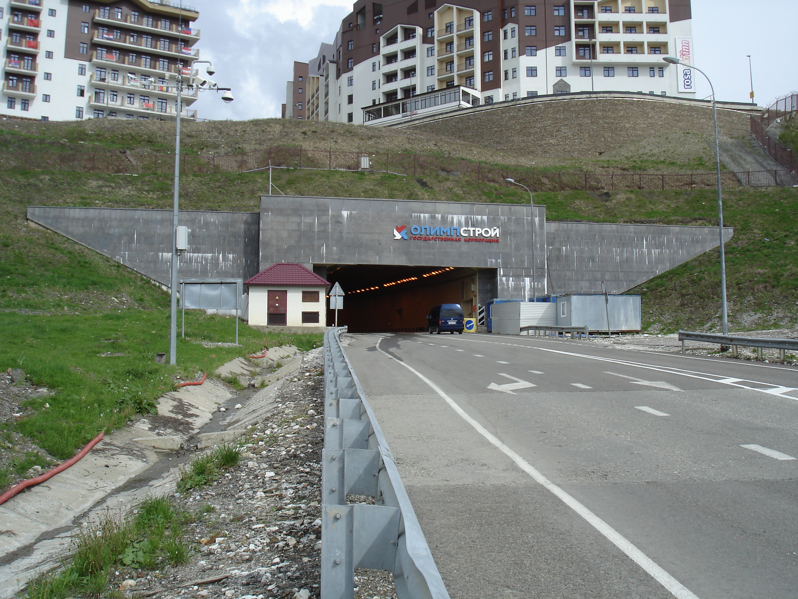 Один из туннелей Олимпстроя в Красной Поляне